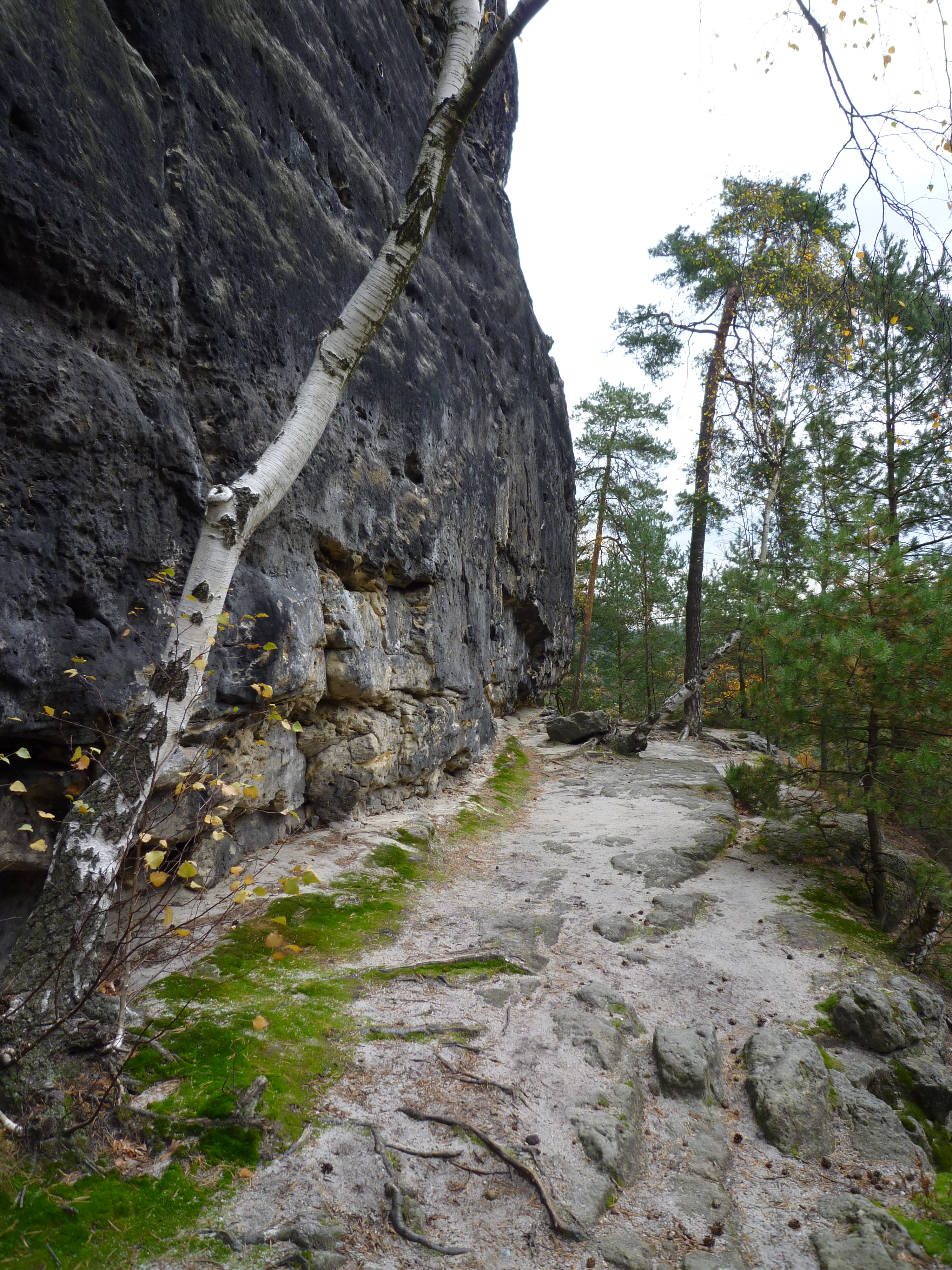 Winterstein, Blick entlang des ehemaligen Wehrgangs, Spuren von Balkenfalzen am Boden und in der Felswand